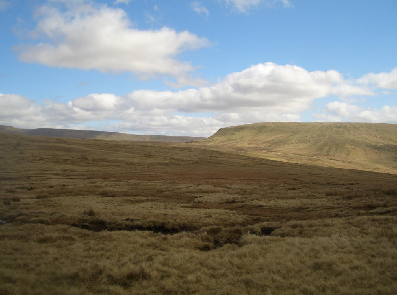 fan fawr